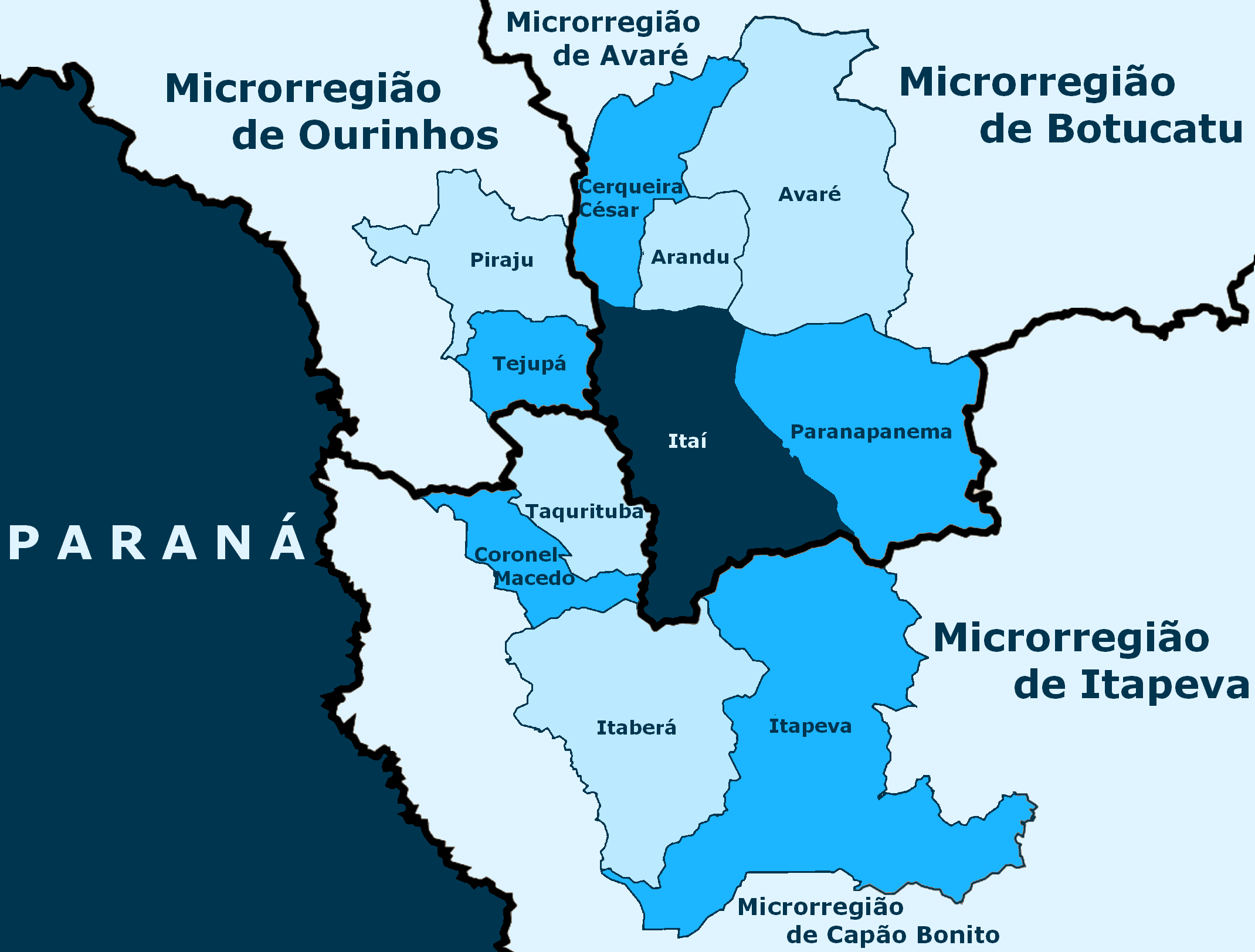 Limites do município de Itaí.